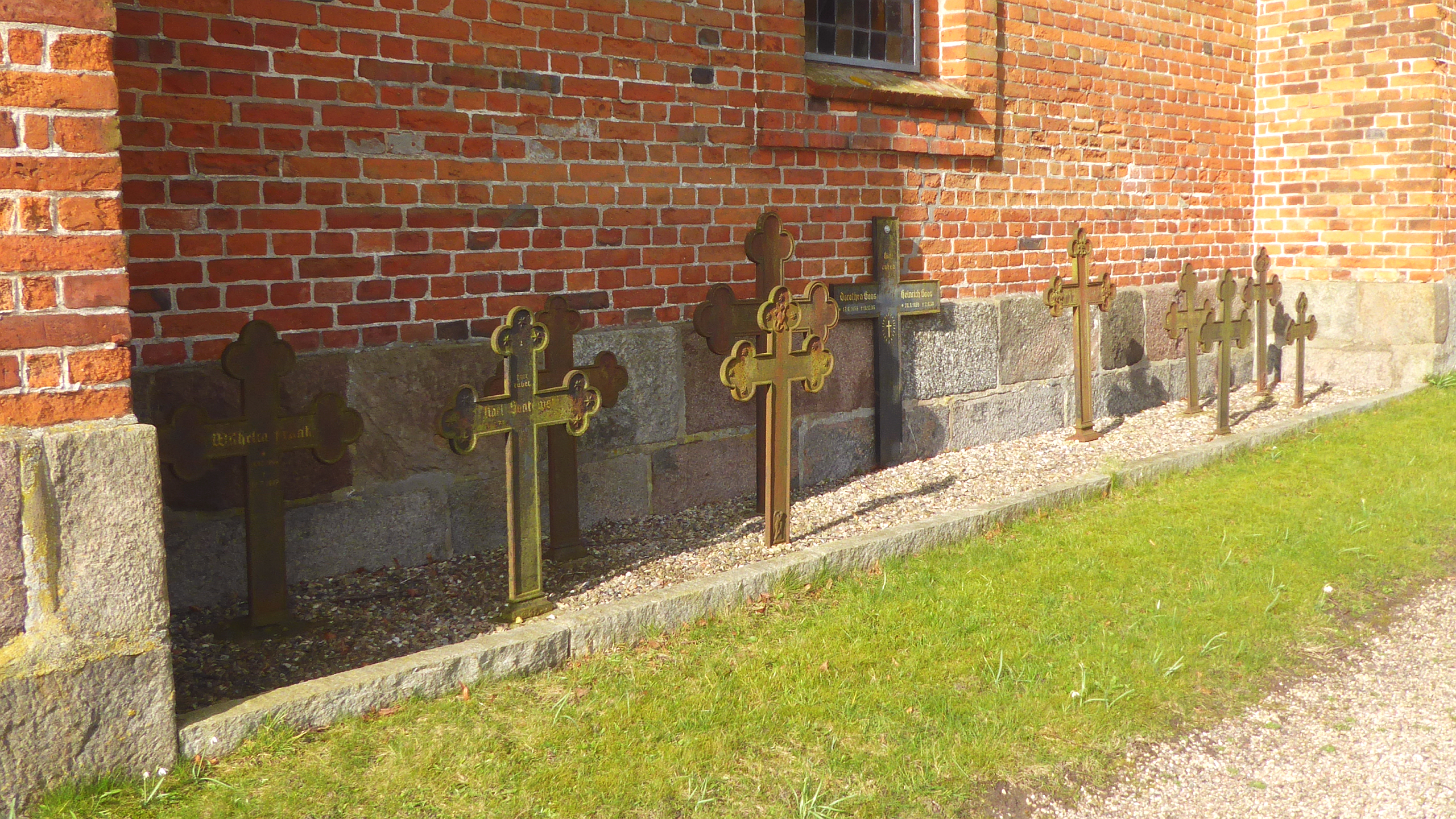 Grabkreuze aus eisernem Kunstguss an der Dreifaltigkeitskirche in Krusendorf bei Schwedeneck, Landschaft Dänischer Wohld in Schleswig-Holstein - Foto Wolfgang Pehlemann P1350938